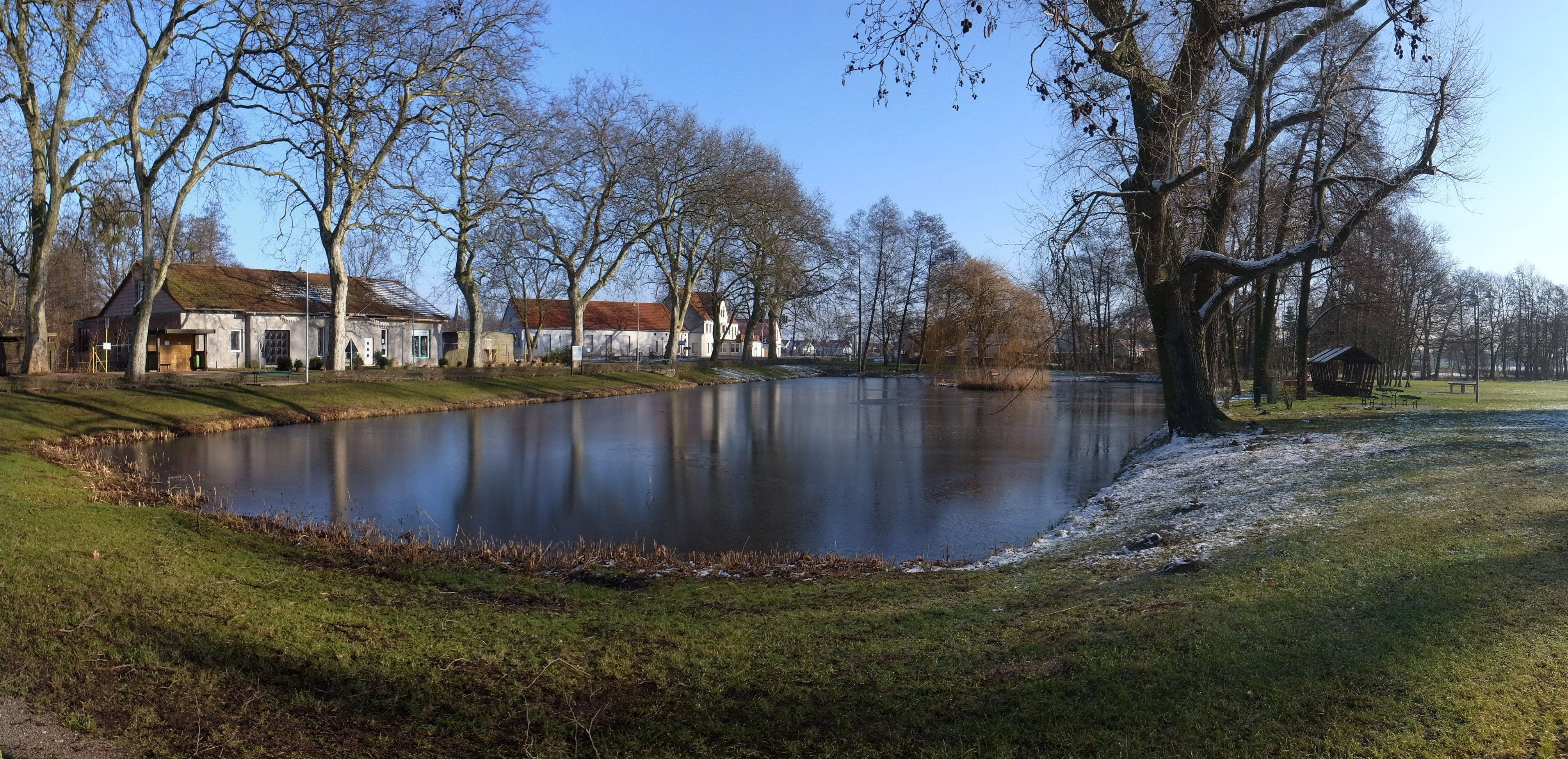 Jütrichau, Dofteich